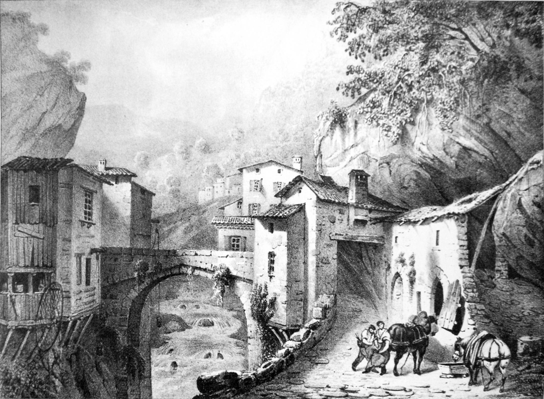 Pont-en-Royans (Isère) ATTENTION ! Ce facsimilé est réalisé en applicant des alterations avec un logiciel graphique à une copie numérique, obtenue à partir d'une prise de photo faite par un non-professionnel. Elle pourrait ne pas être parfaitement réussie.